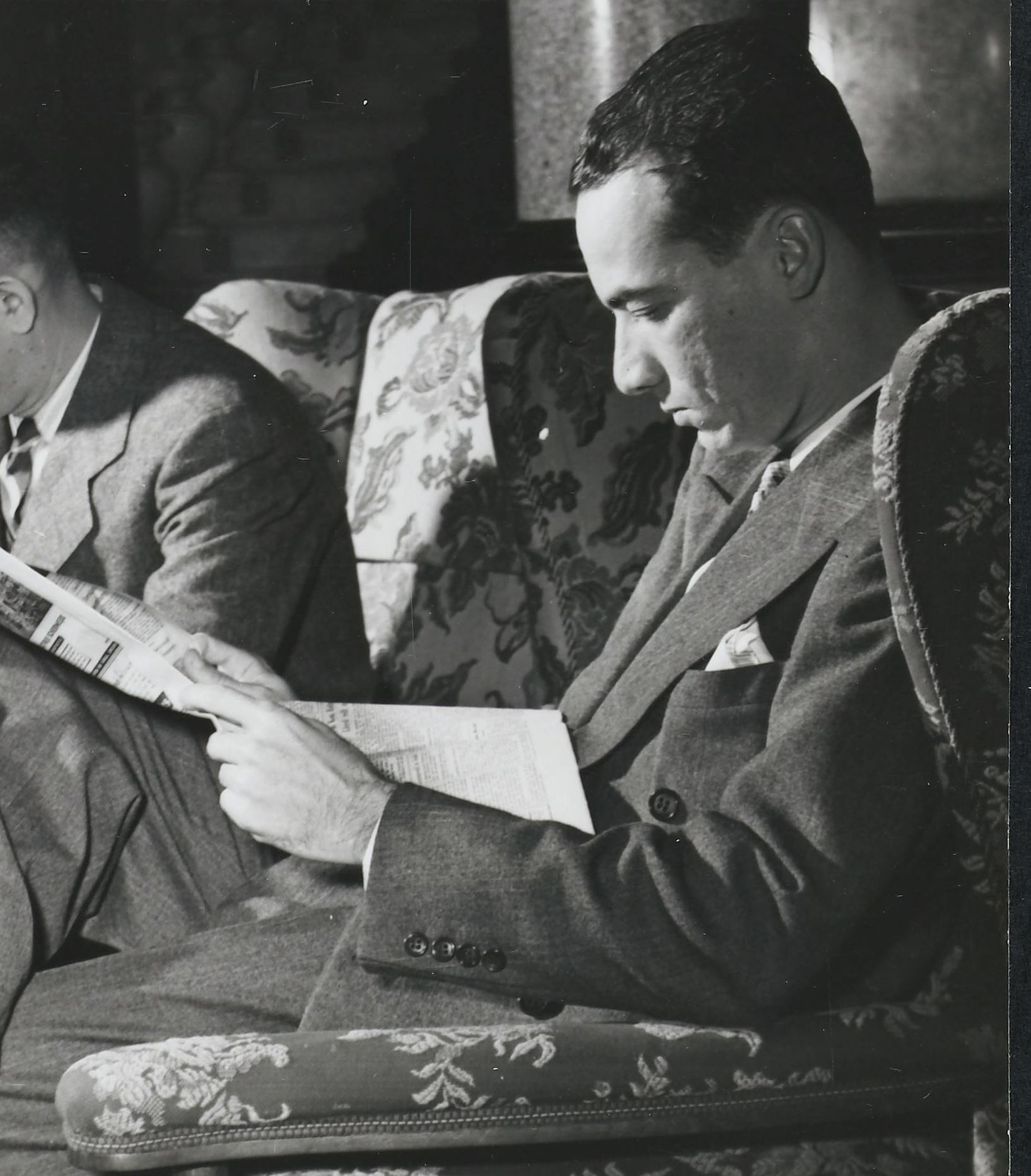 IdentificatieTitel(s): Twee van de deelnemers aan de RTC: Percy Wijngaarde en P.G.A. FindlaySurinamers in Nederland: 29 foto's uit het archief van Ons Vrije Nederland (serietitel)Objecttype: documentaire foto Objectnummer: NG-2005-19-15Omschrijving: Een van de deelnemers namens Suriname aan de Ronde Tafel Conferentie tussen Nederland en de West: de journalist Percy Wijngaarde, lid van de Surinaamse staten, bestuurslid van de Nationale Partij en redacteur van "Dagblad Suriname". Naast hem zit de heer P.G.A. Findlay.VervaardigingVervaardiger: fotograaf: ParticamPlaats vervaardiging: Den HaagDatering: feb-1948Materiaal: fotopapier Techniek: fotografieAfmetingen: h 20 cm. × b 15 cm. OnderwerpWat: Rondetafelconferentie (1948)Wanneer: 1948-02 - 1948-02Waar: Den HaagNederlandSurinameWie: Percy WijngaardeP.G.A. FindlayVerwerving en rechtenVerwerving: aankoop 2005Copyright: Publiek domein